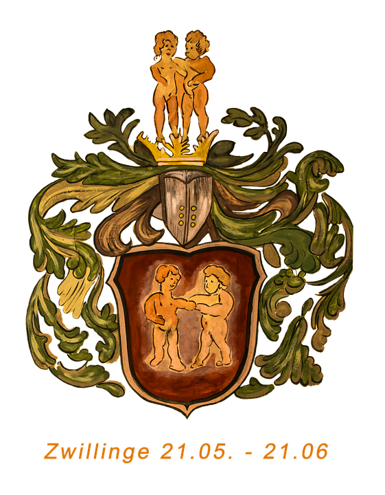 Gemeni-zodiac